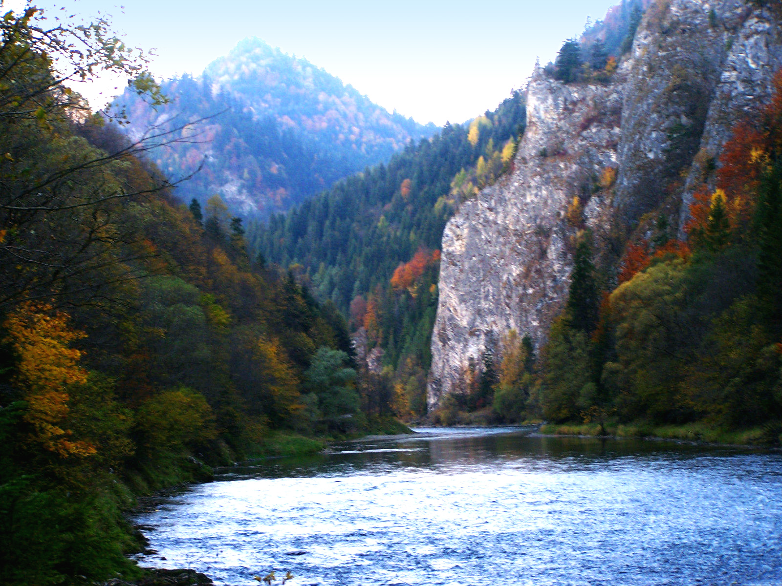 Dunajec (Pieniny)